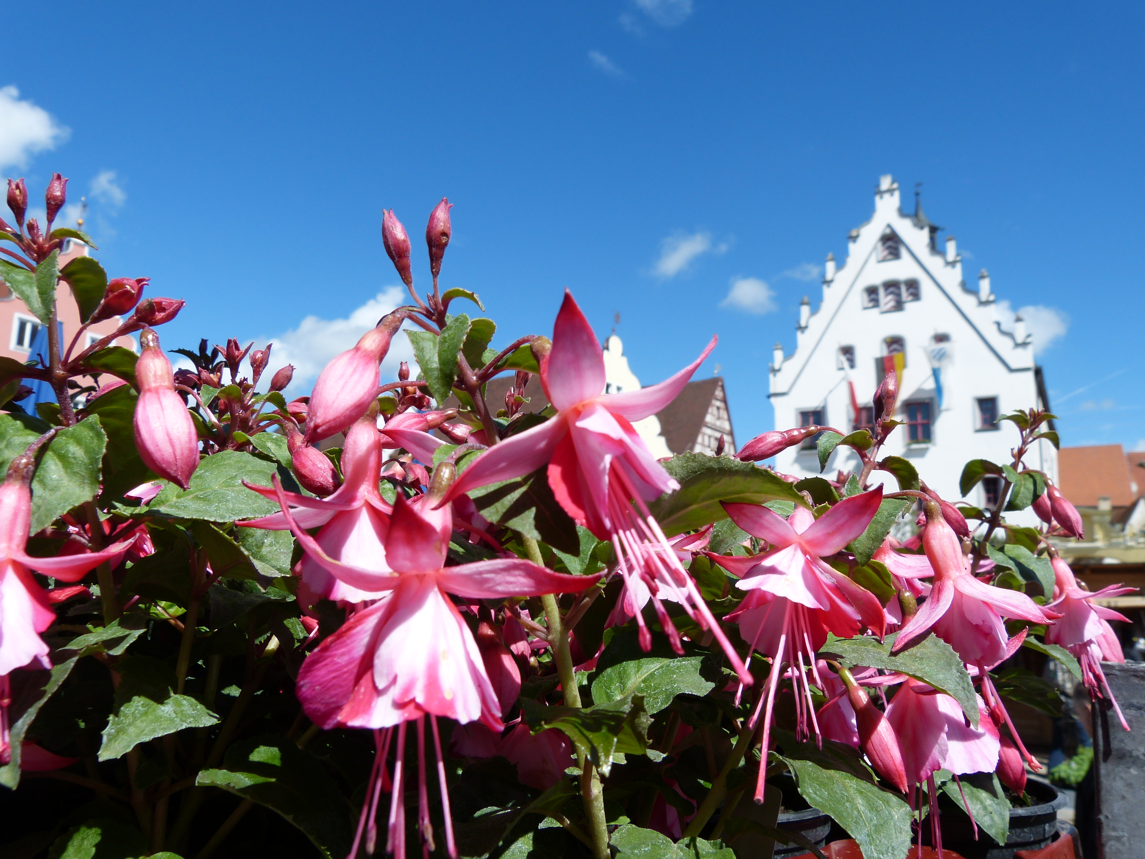 Fuchsienmarkt in Wemding am historischen Marktplatz